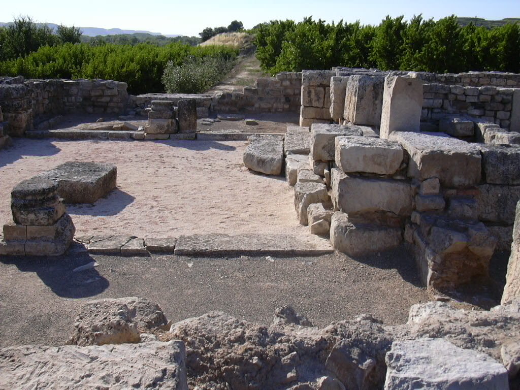 Villa Fortunatus, villa rustica romana cerca de Fraga, Aragón, España - Entrada a la basilica paleocristiana